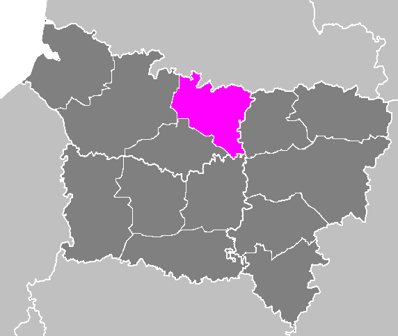 Maps of arrondissements and cantons of France: Arrondissement de Péronne.PNG